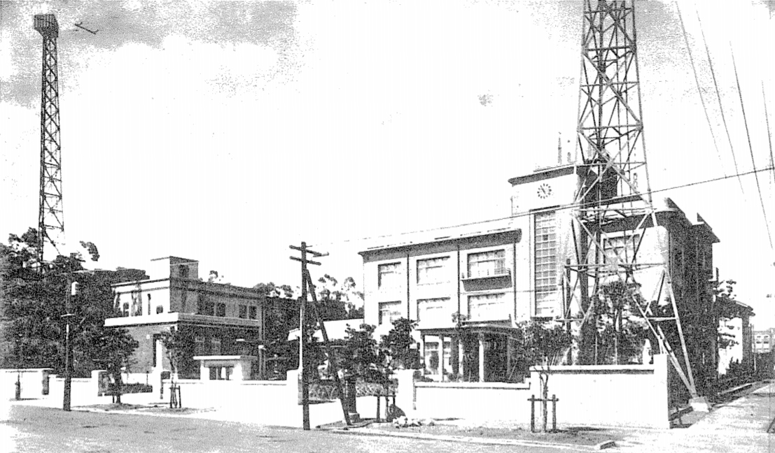 中文（台灣）: 1937年興建的台灣氣象台，隔年完工。原為圓形的台北測候所